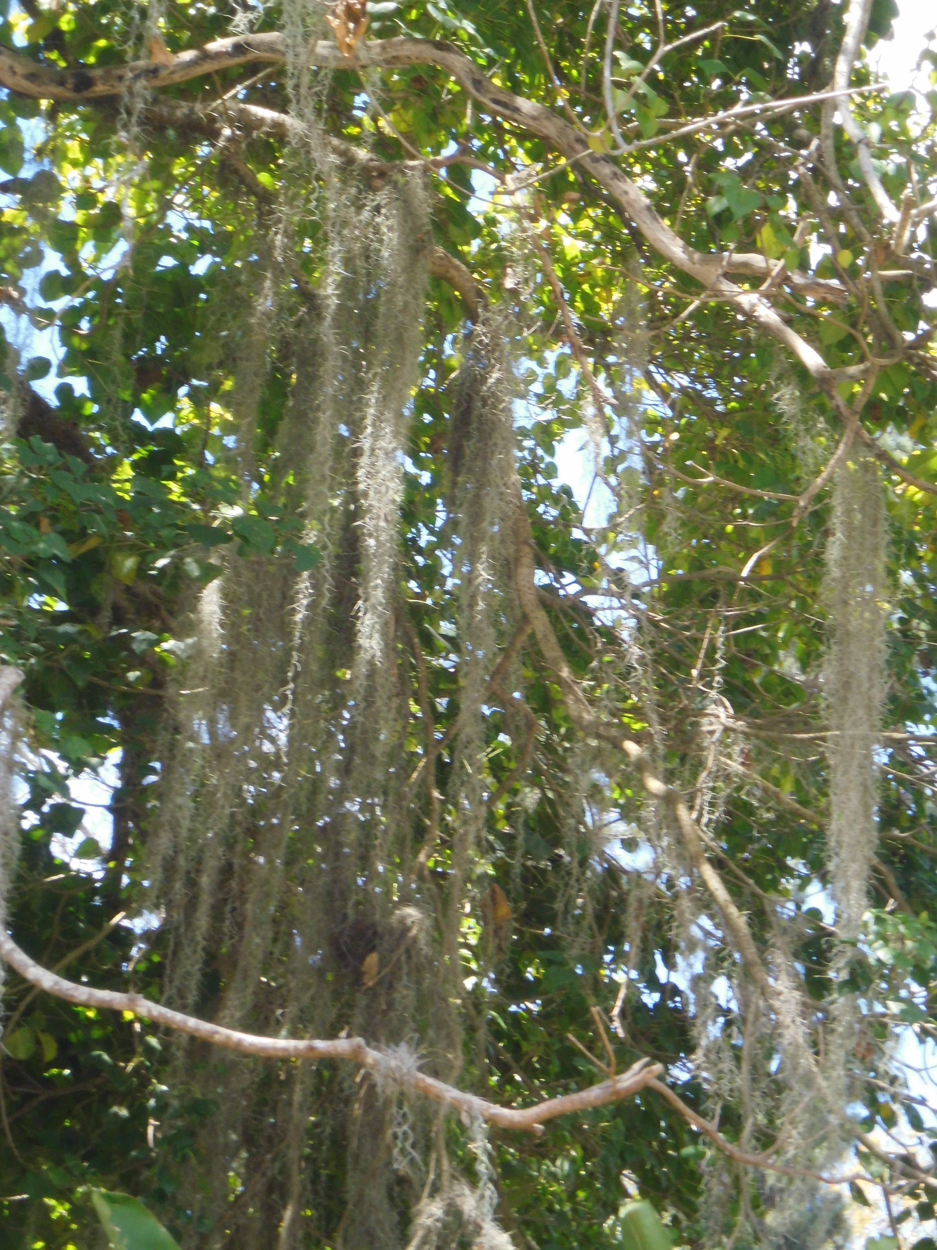 Tillandsia usneoides (L.) L. (Musgo español) localizadas en La Boyera municipio El Hatillo, estado Miranda - Venezuela.